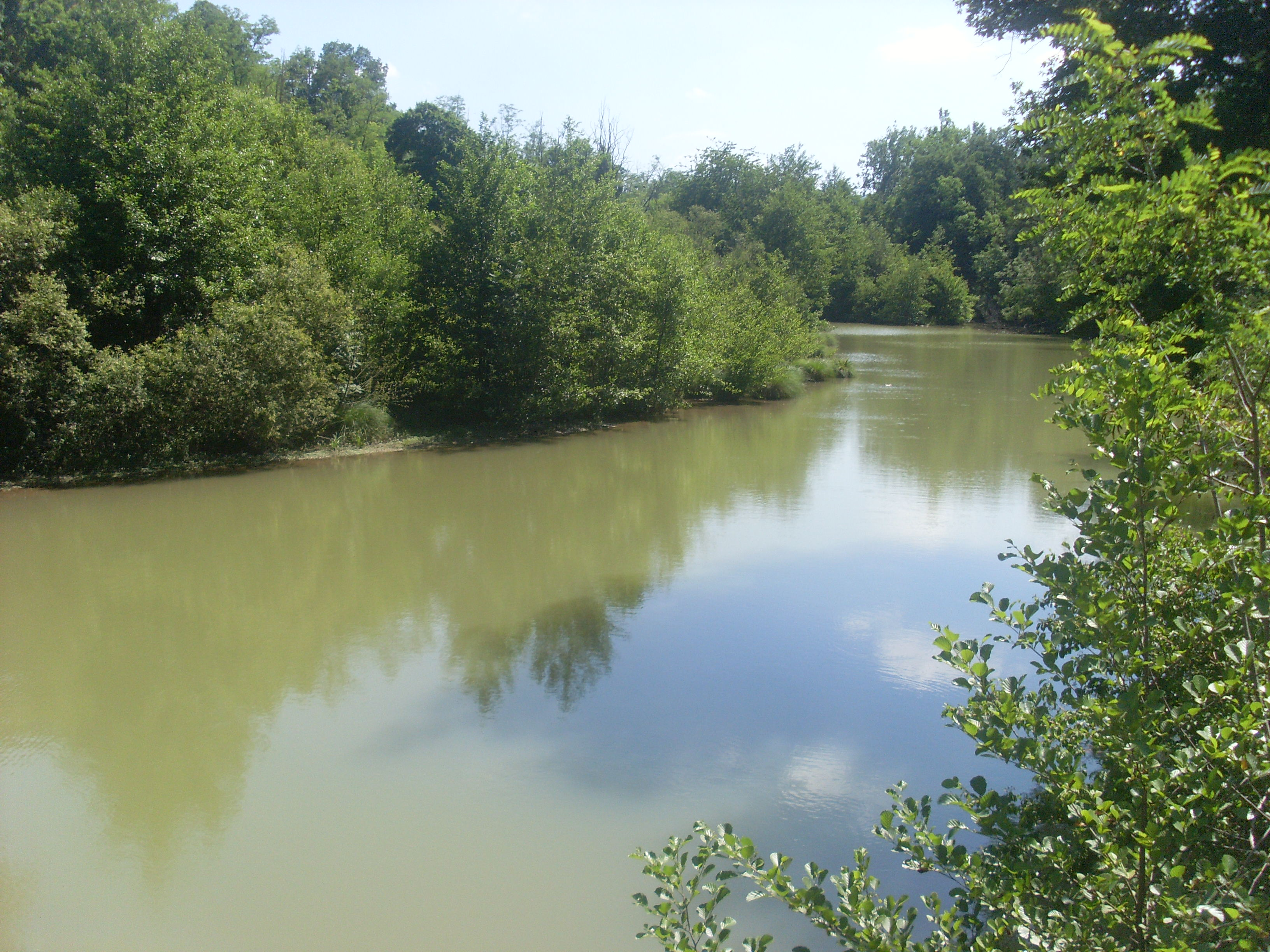 Le Volp au pont du Diable, Saint-Christaud, Haute-Garonne. Vue vers l'amont.